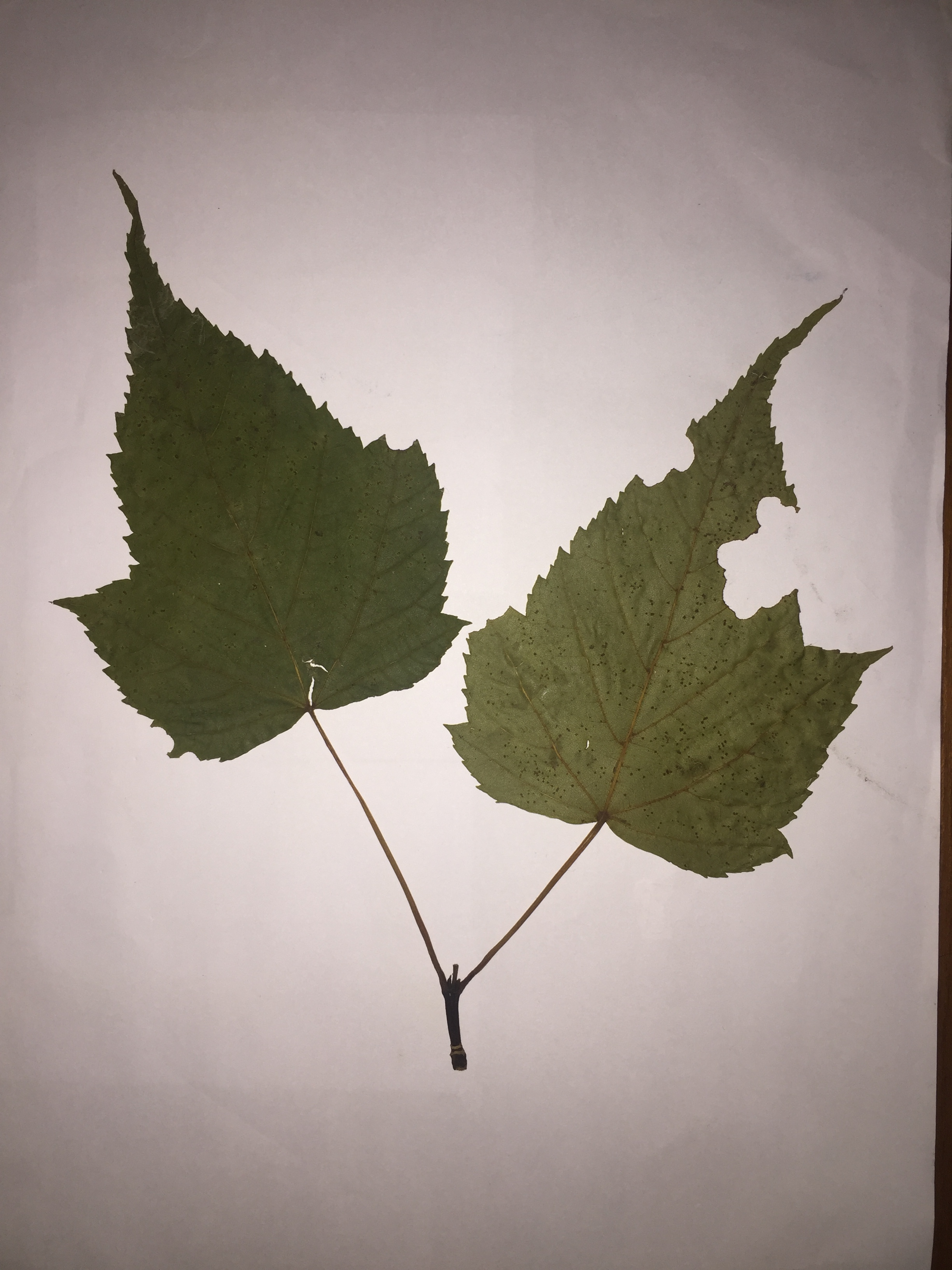 中文（台灣）: 2017/06/11拉拉山